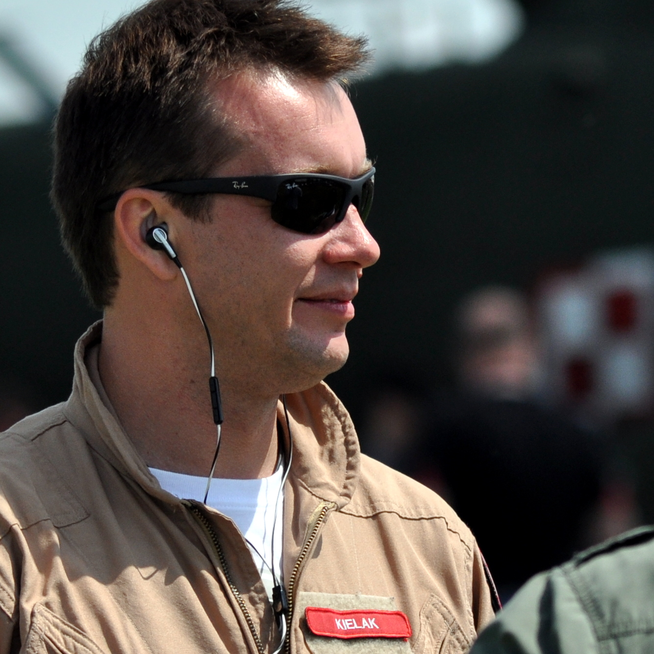 Artur Kielak, pilot wyczynowych samolotów akrobacyjnych. Wielokrotny reprezentant Polski na Mistrzostwach Świata i Europy w akrobacji samolotowej.